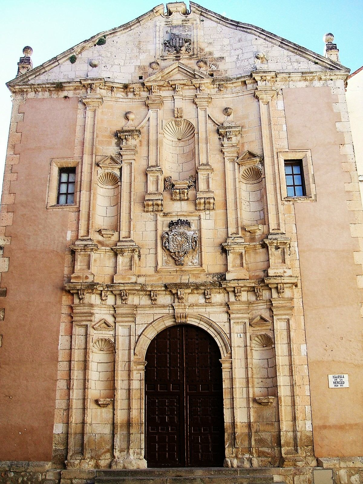 Fachada de la iglesia del antiguo Convento de la Merced, hoy integrada en el Seminario Conciliar de San Julián, Cuenca (España)